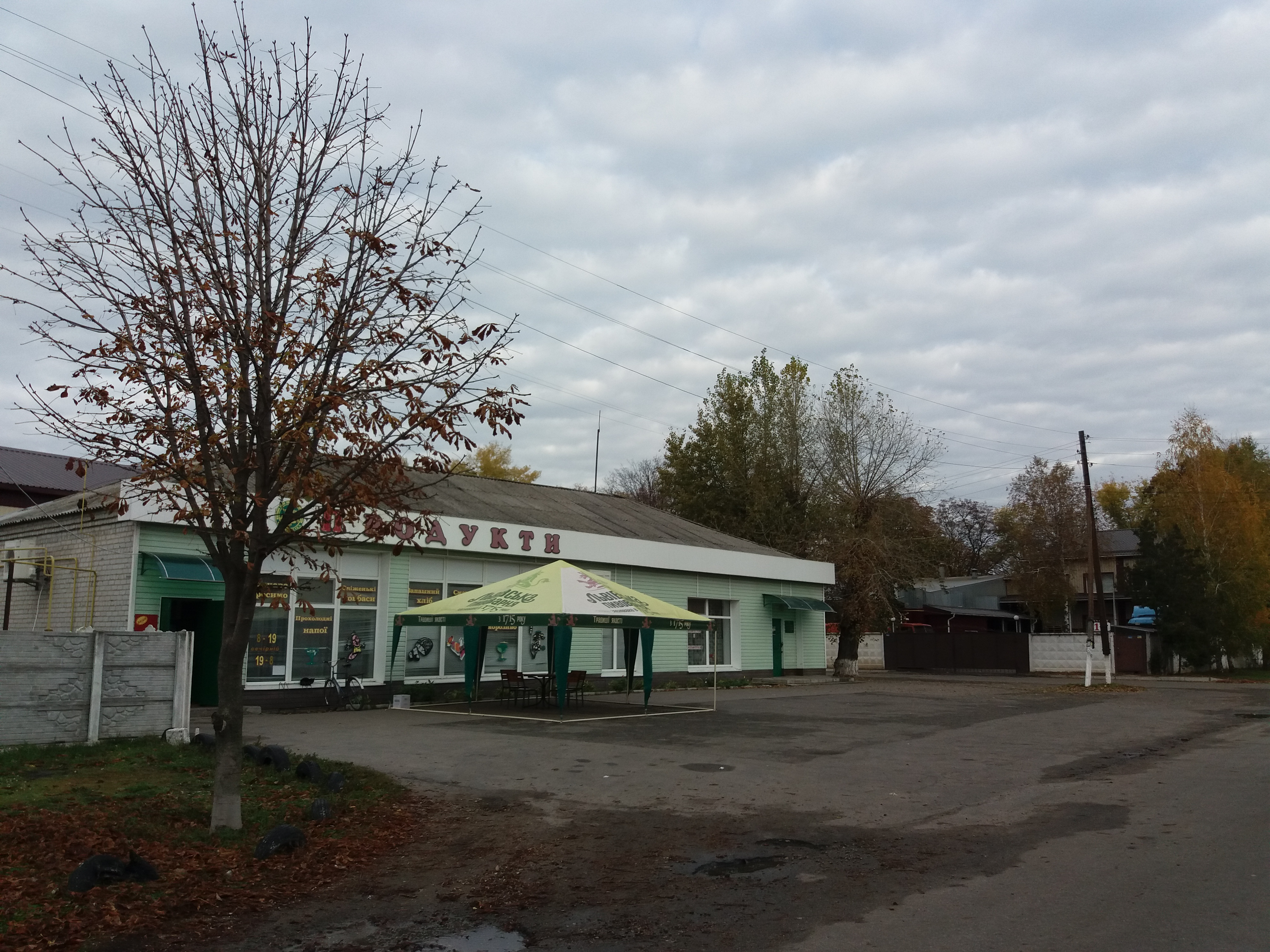 Село Ялинці Кременчуцького району Полтавської області